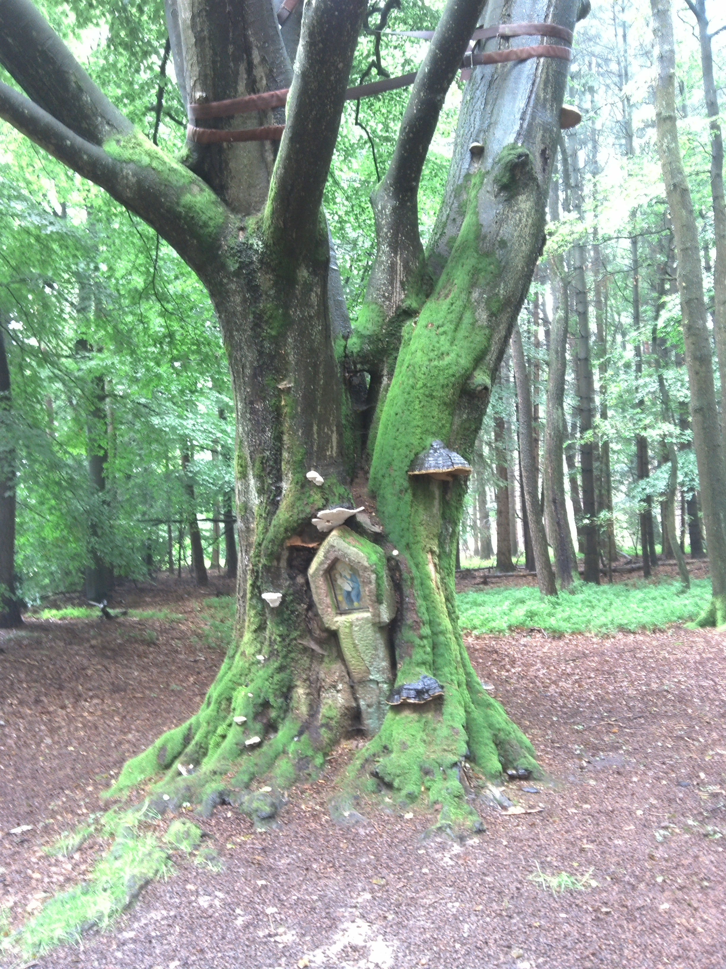 Bildstock frueher